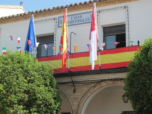 Ayuntamiento de Turleque